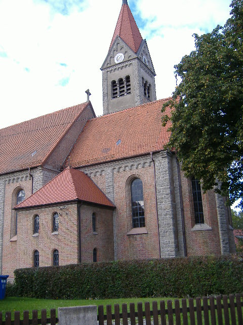 Katholische Pfarrkirche Maria Rosenkranzkönigin in Schretzheim, einem Stadtteil von Dillingen an der Donau (Bayern)